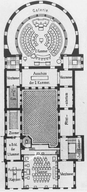 Grundriss des Ständehauses, Sitz der Landstände des Großherzogtums Hessen, Ende des 19. Jahrhunderts. Das Ständehaus wurde im Laufe des Zweiten Weltkriegs zerstört. Heute befindet sich an dessen Stelle am Louisenplatz in Darmstadt die Zentrale der Darmstädter Sparkasse. Beide Autoren des Buches sind vor mehr als 70 Jahren gestorben. Die Rechte sollten beim Architekten liegen. Dieser muss früher gelebt haben, da das Ständehaus 1836-1839 errichtet wurde. Welchen Stand die Skizze genau zeigt, ist anhand der Quellenlage jedoch nicht zu erkennen.